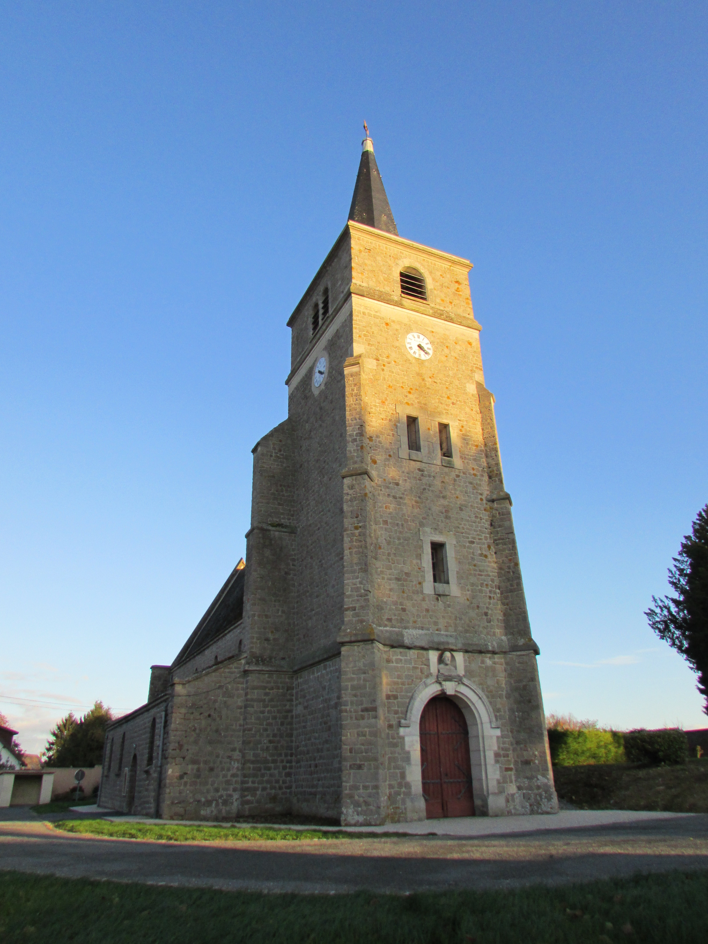 L'église de Cartigny.